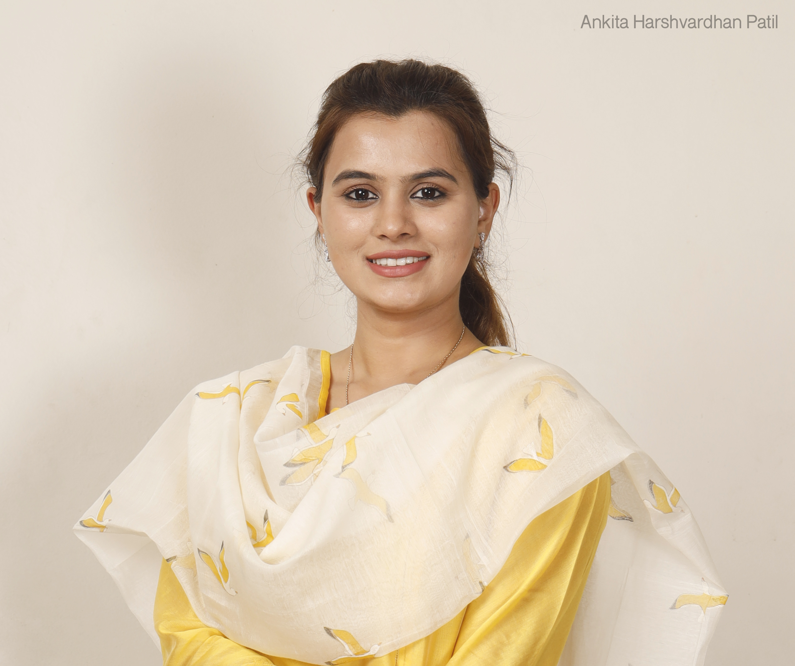 AHPatil